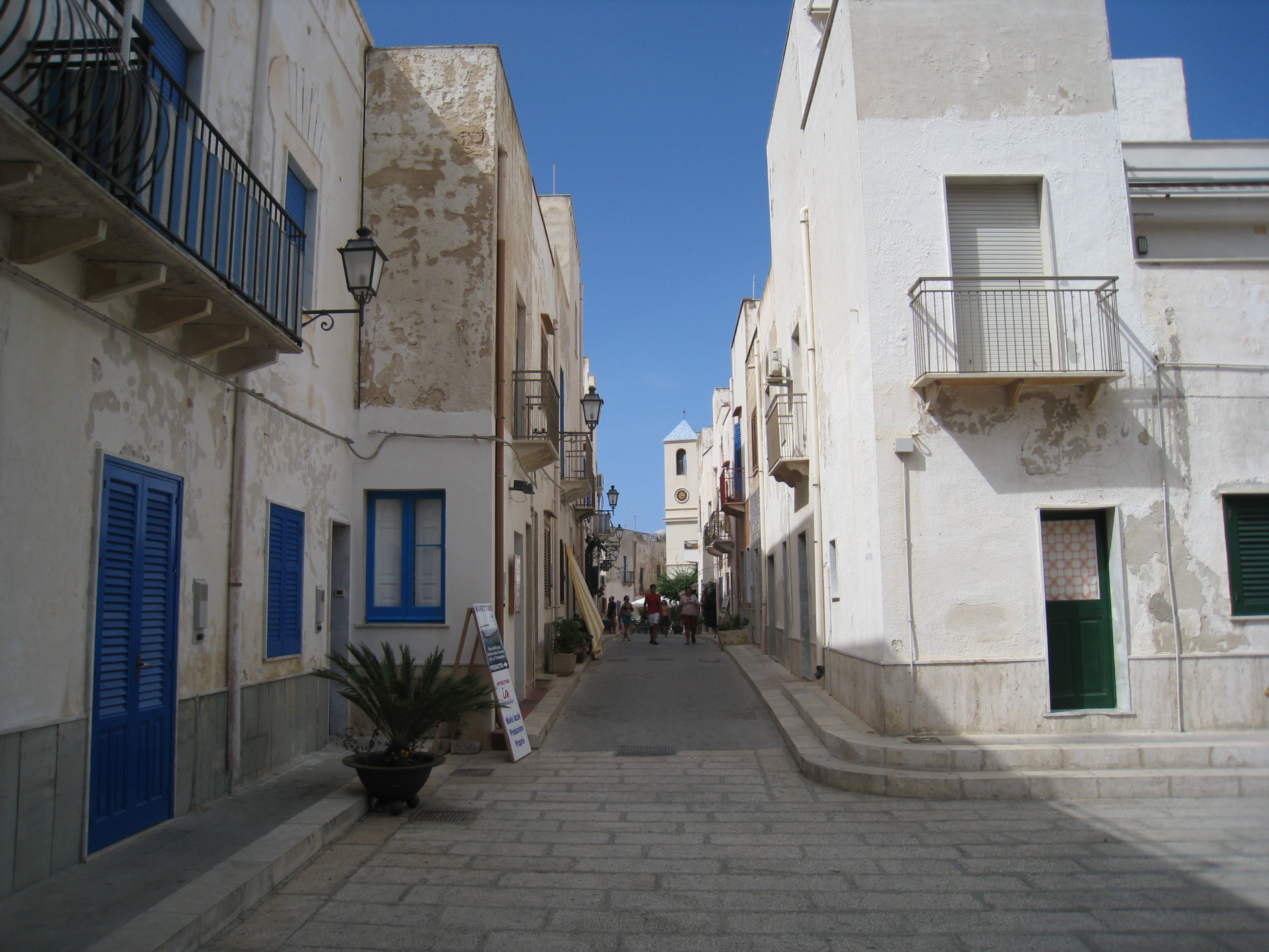 Marettimo